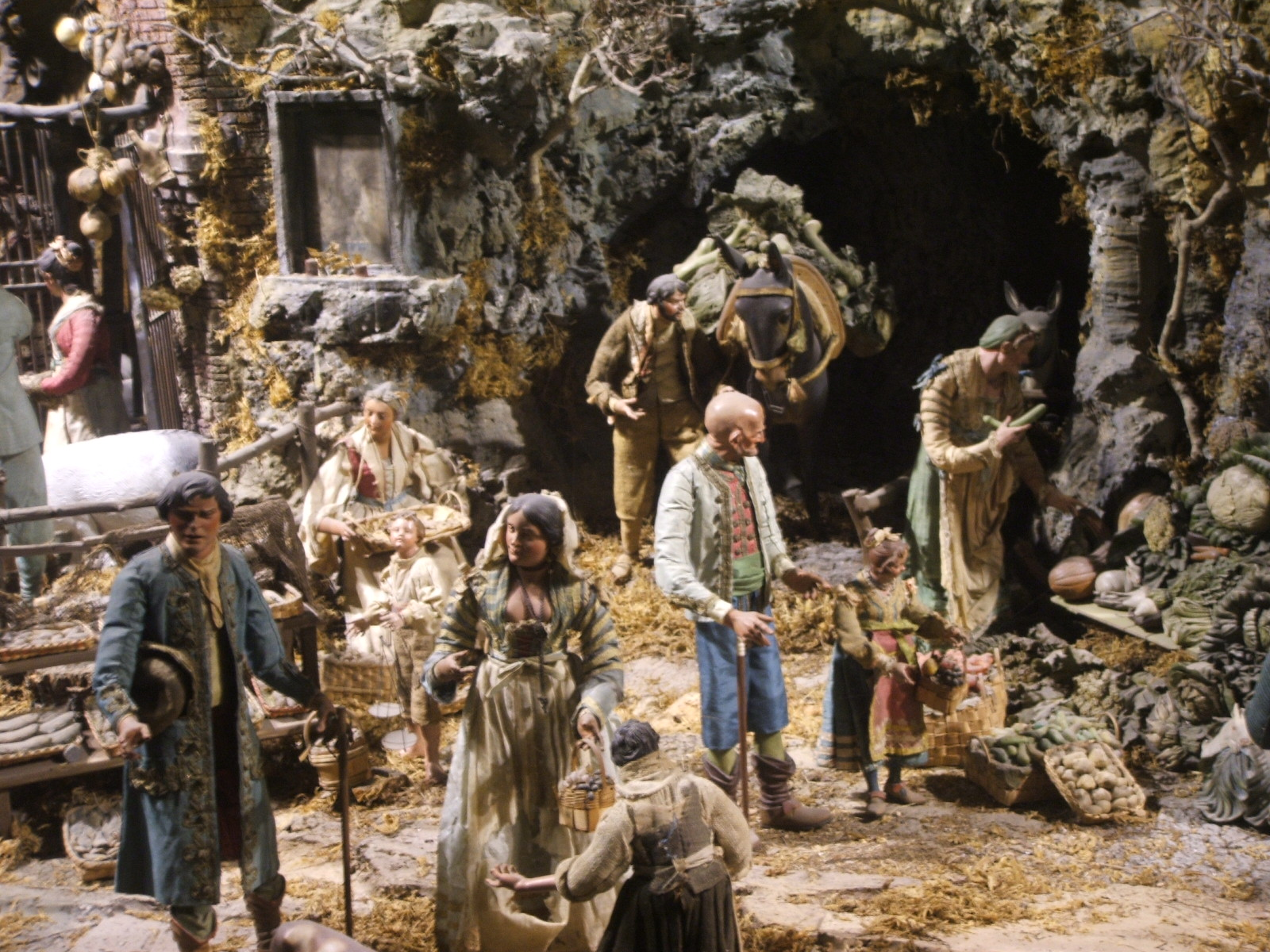 Caserta, Reggia di Caserta - Presepe napoletano. Epoca: seconda metà del XVIII secolo. Materiali: terracotta, stoppa, filo di ferro e sughero.